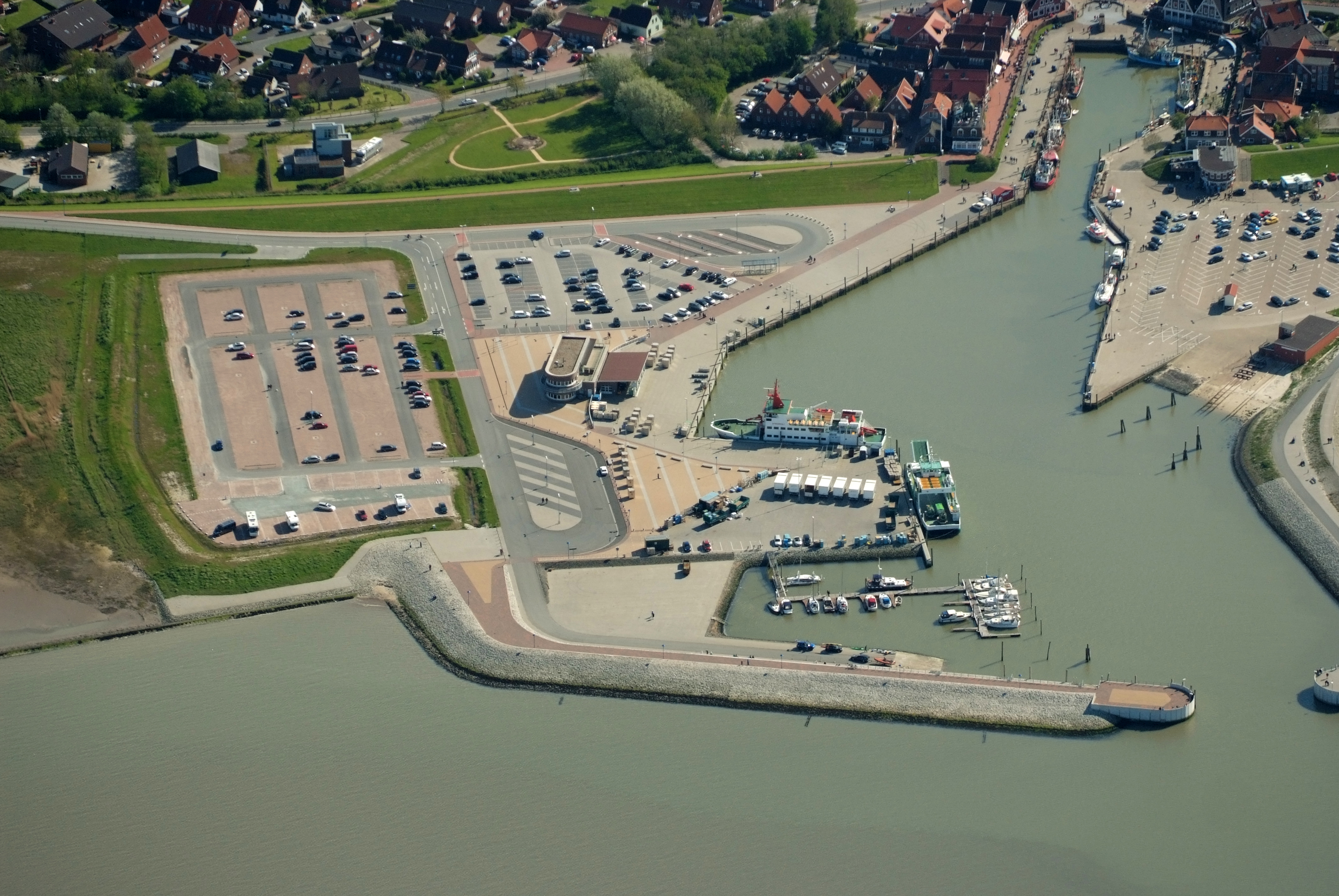 Fotoflug vom Flugplatz Nordholz-Spieka über Bremerhaven, Wilhelmshaven und die Ostfriesischen Inseln bis Borkum